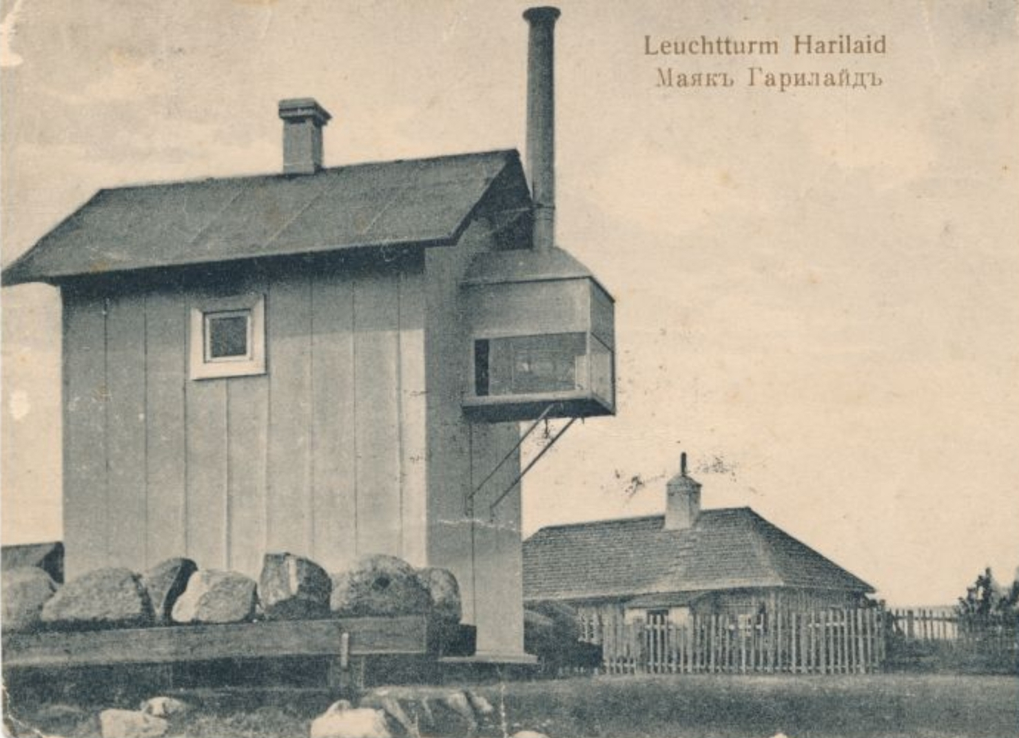 Harilaiu tulepaak